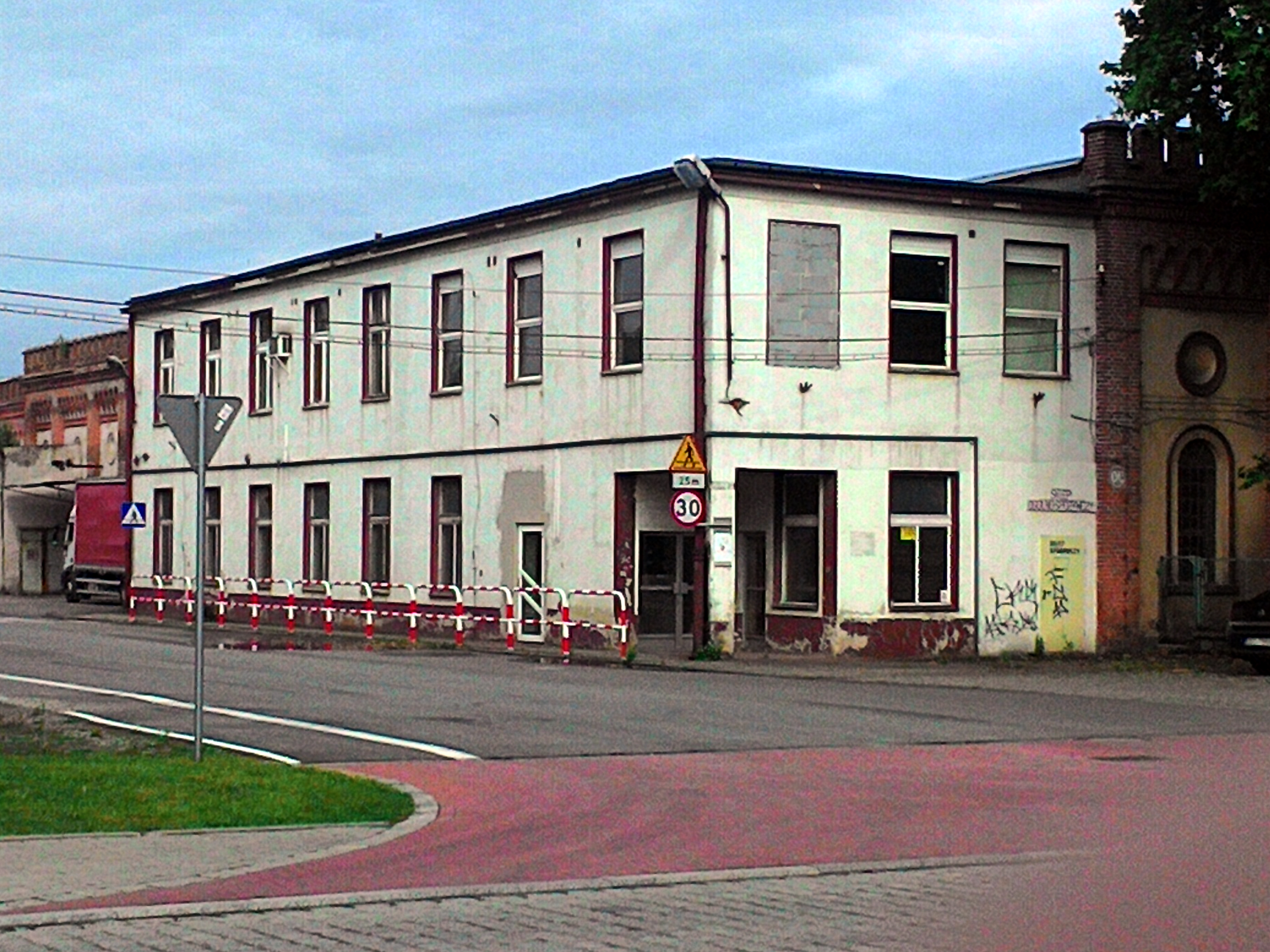 Portiernia Zakładów Przemysłu Bawełnianego „Frotex” w Prudniku.